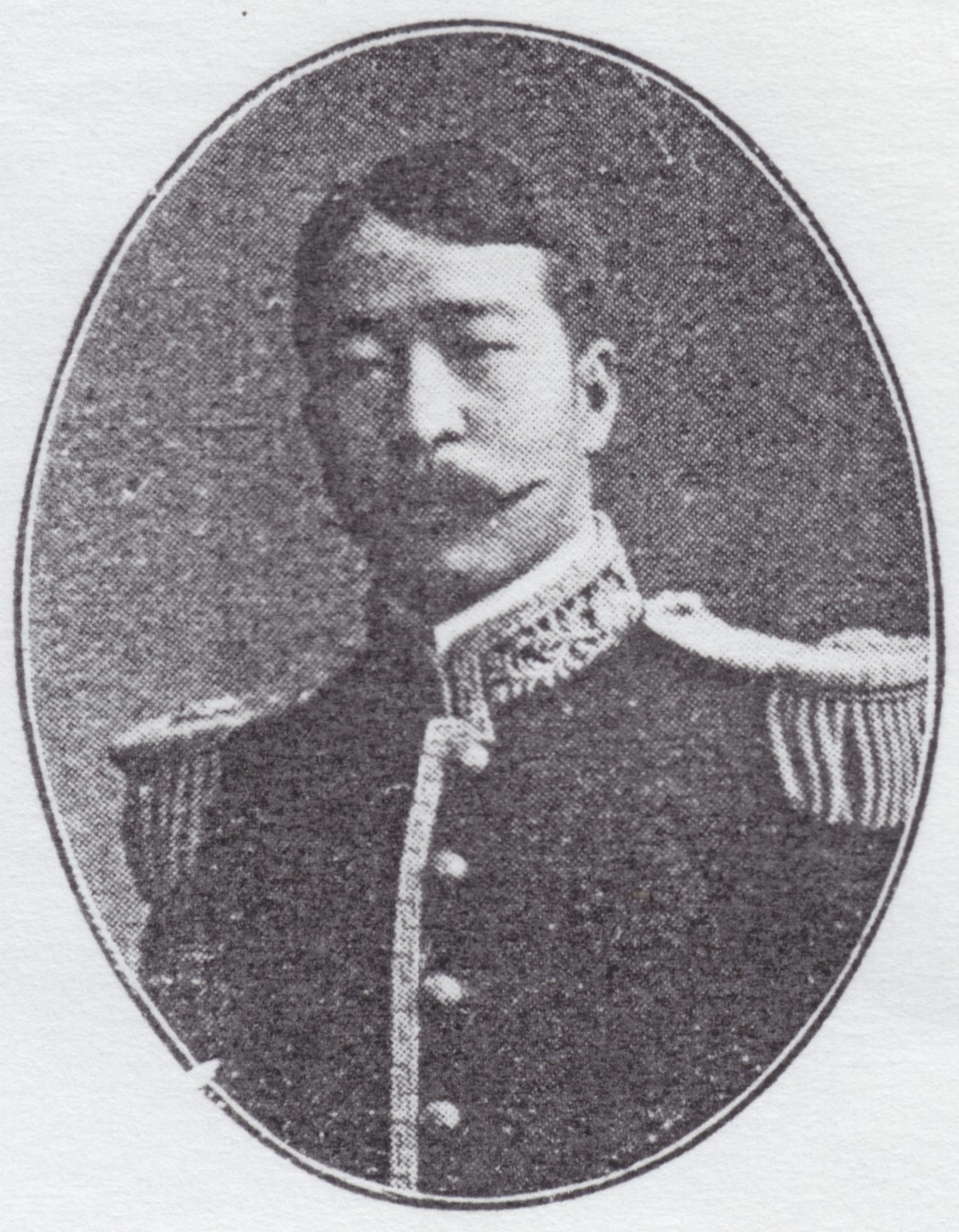 貴族院議員・侯爵大炊御門幾麿の写真